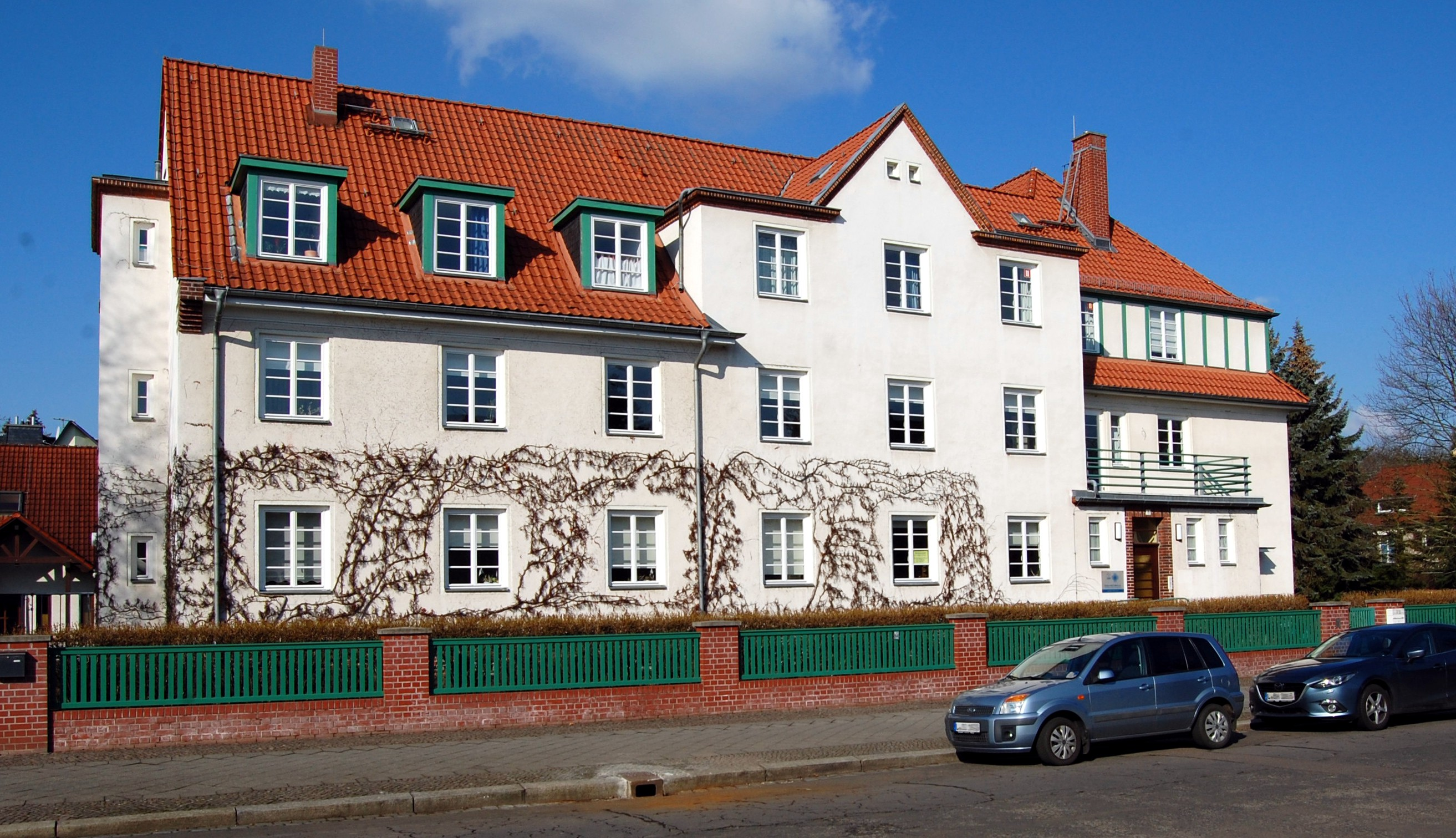 Das "Franz-Rendtorff-Haus", die Zentrale des Gustav-Adolf-Werks, Pistorisstraße 6, 04229 Leipzig, wurde 1930 als Wohnheim für Diasporastudenten errichtet.